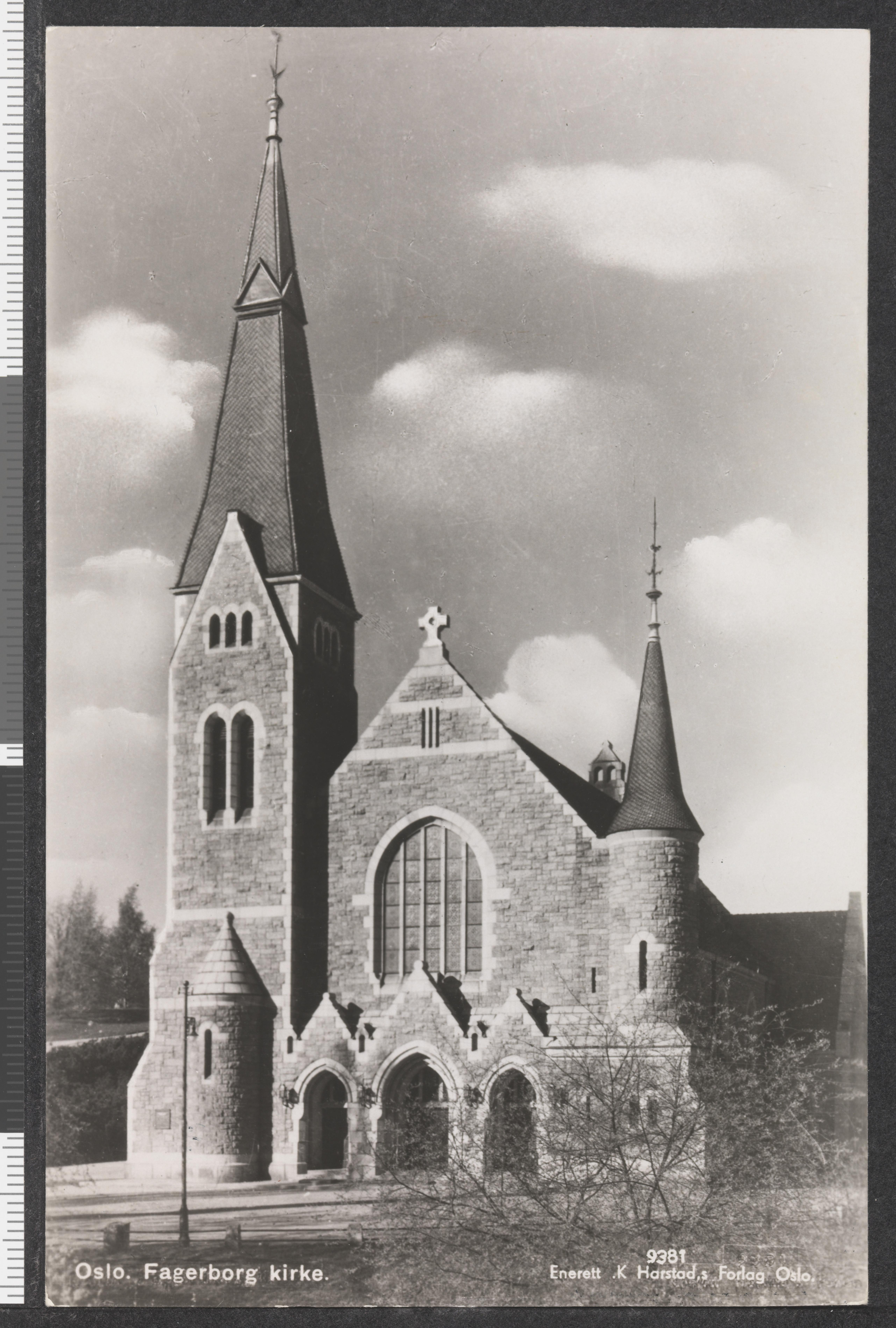 Bildet er hentet fra Nasjonalbibliotekets bildesamling Fagerborg,Fagerborg kirke, Oslo, Oslo